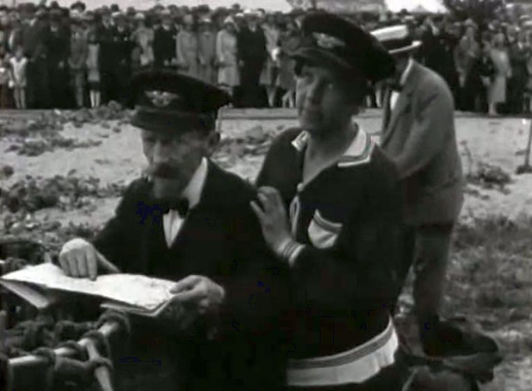 Willem Pottum en Willemina Ruitman bereiden een ballonvlucht voor (still uit de film )